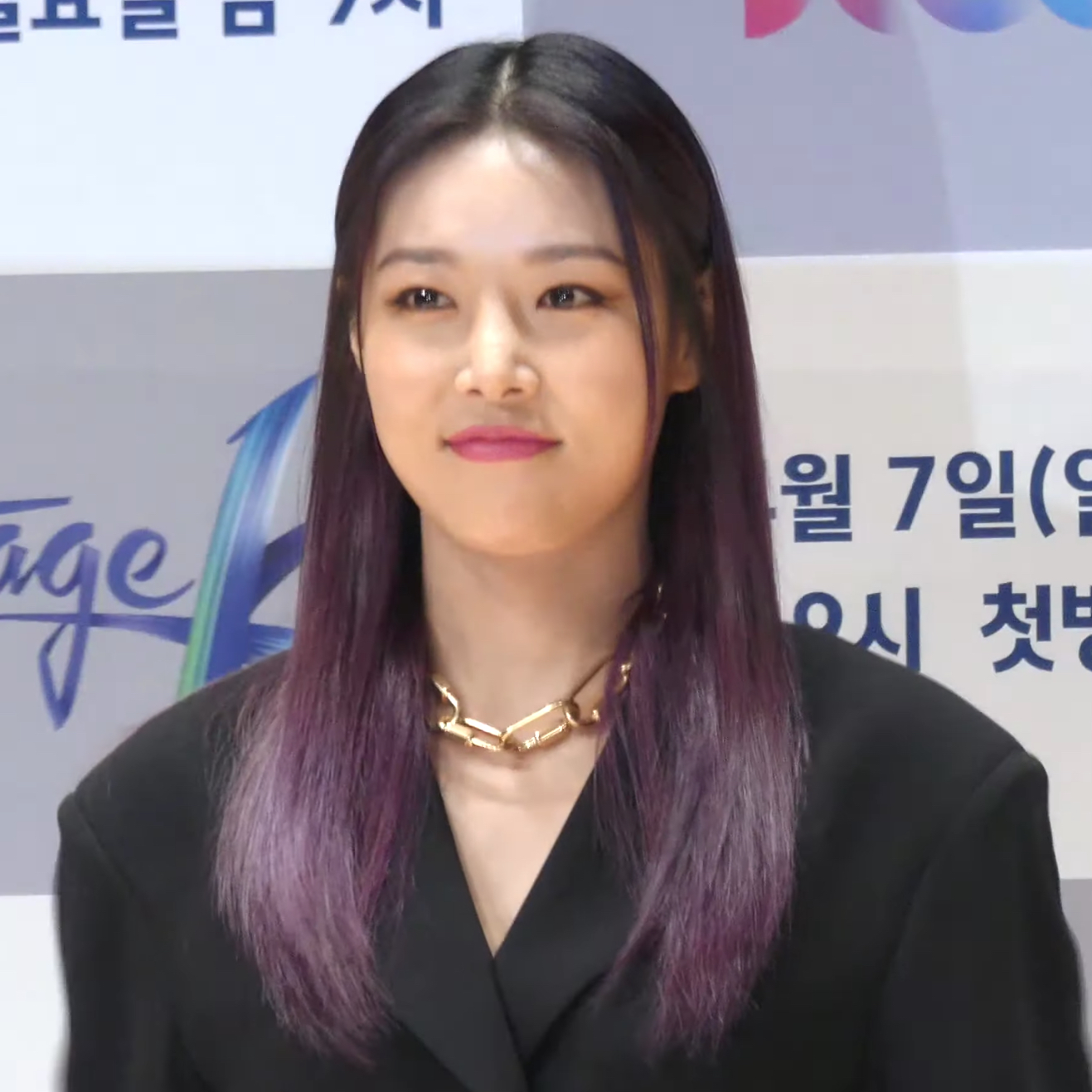 JTBC 글로벌 K-POP 챌린지 '스테이지K' 제작발표회가 2일 오후 서울 마포구 JTBC 사옥에서 열렸다.